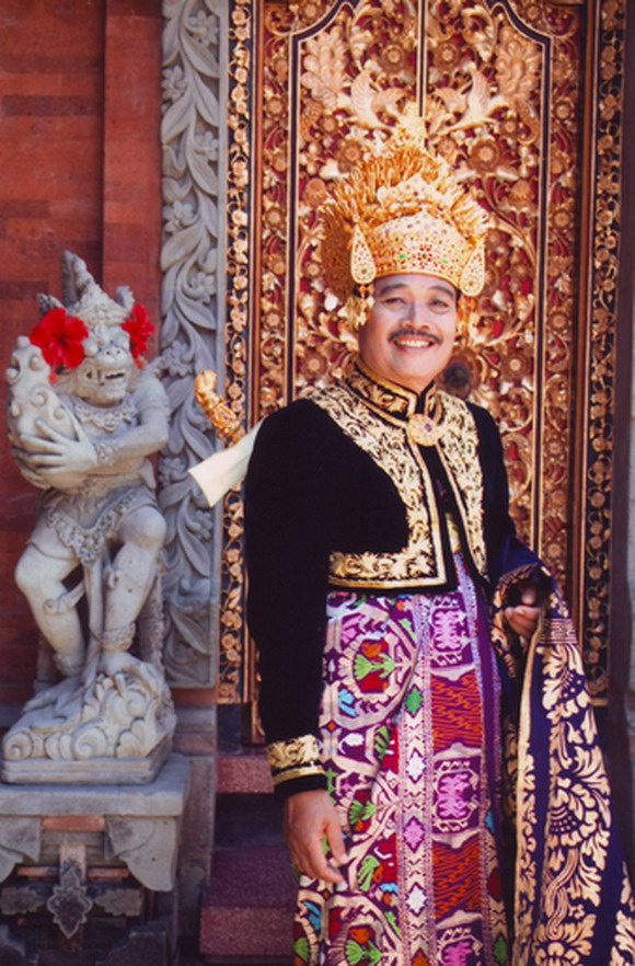 Nyoman Rudana in Royal Balinese Costume